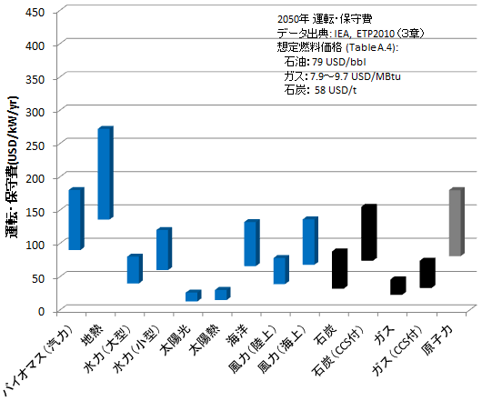 各種発電所の設備容量あたりの運転・保守費予測 (2050年) データ出典： IEA, Energy Technology Perspectives 2010, Chapter 3, Table 3.2 - 3.5, Table A.4